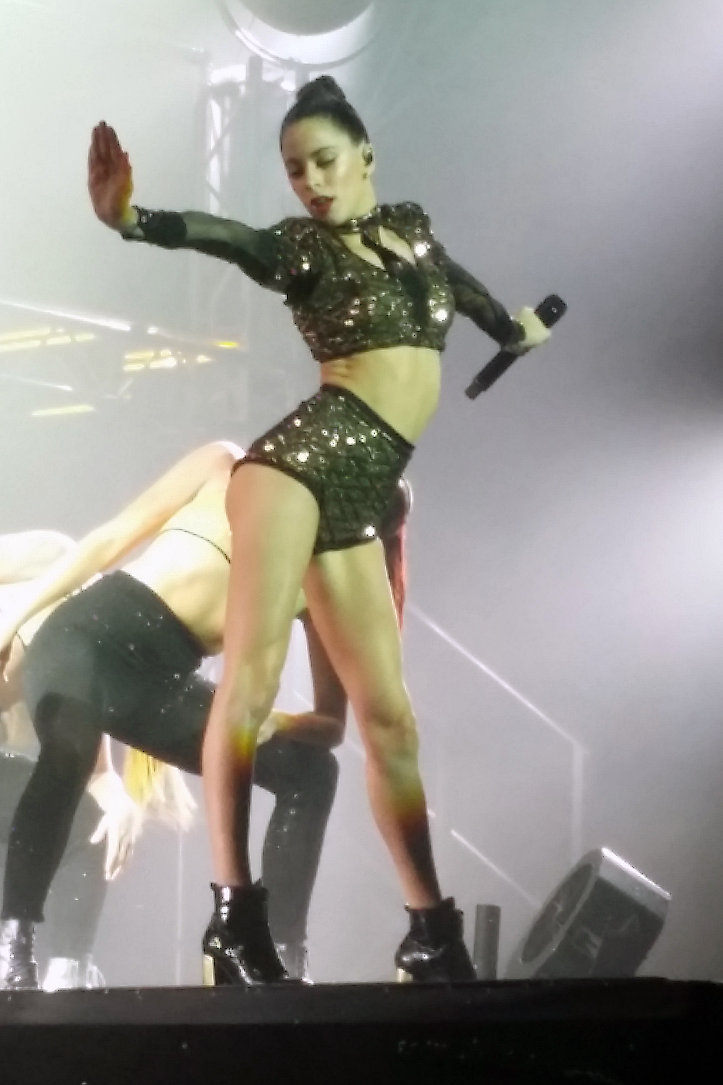 Tini lors de son concert "Got Me Started Tour" à Paris en le 23 avril 2017